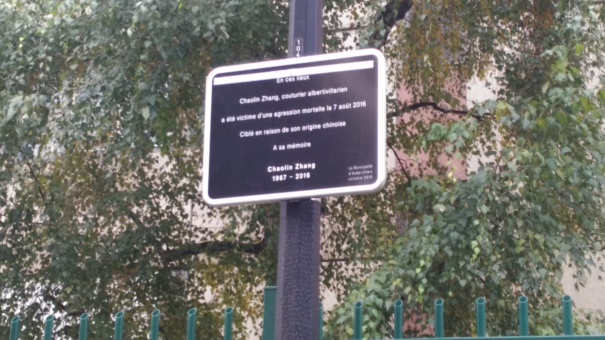 Plaque dédiée à Zhang Chaolin apposée par la Municipalité d'Aubervilliers en octobre 2016 sur les lieux de son agression, au 61 rue des écoles à Aubervilliers.